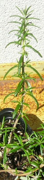 La bildo estas kopiita de en. La originala priskribo estas: cam-corder'ed myself on rusting iron